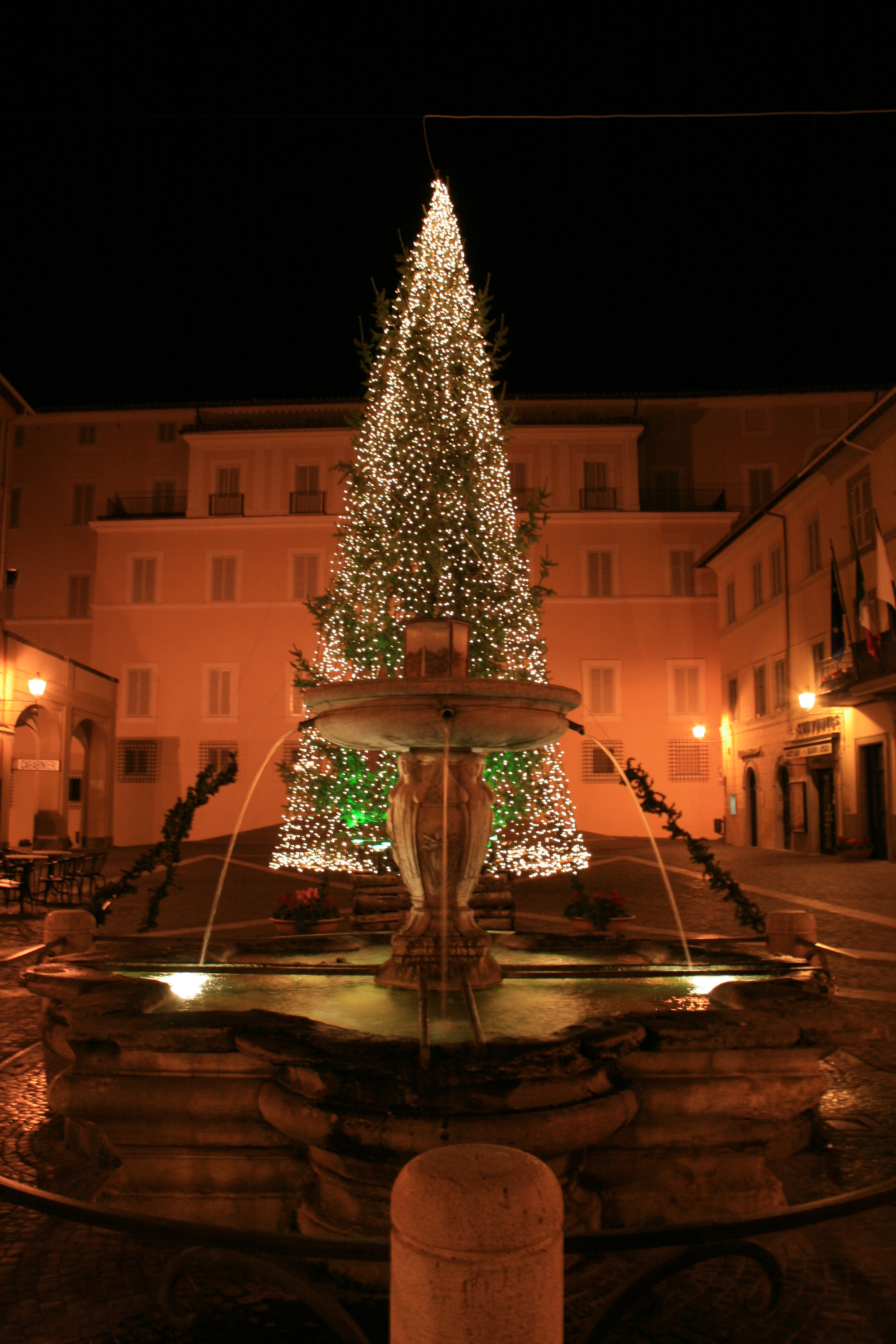 Autore: Marco Evangelista Fonte: Foto Personale (Scattata con una Canon Eos 400D) Foto della Piazza della Libertà di Castel Gandolfo(RM) scattata il 25 dicemdre 20006